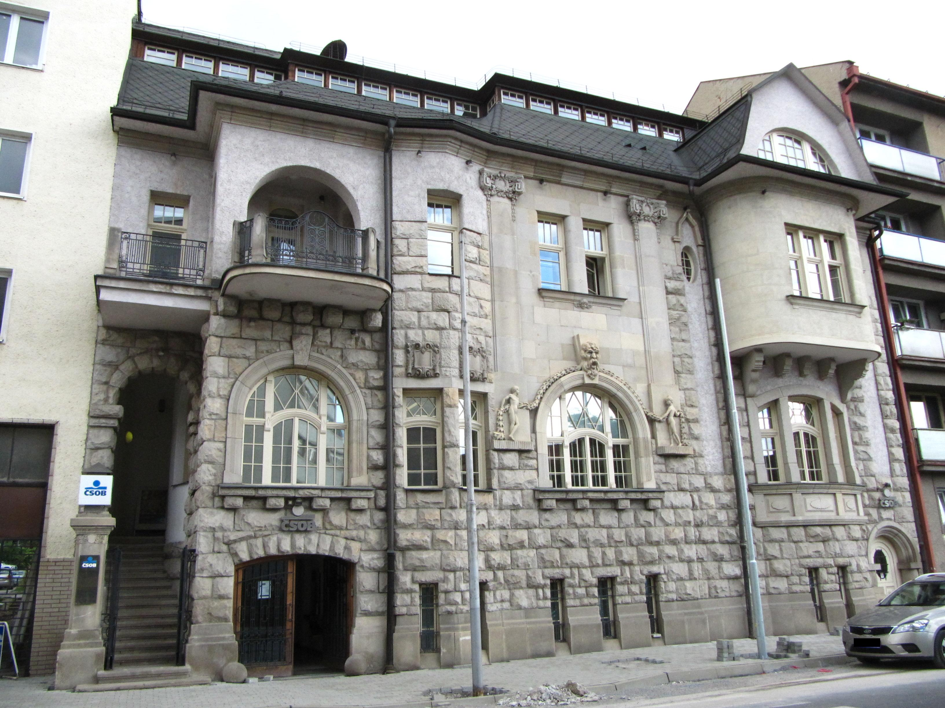 Budova ČSOB v Banskej Bystrici